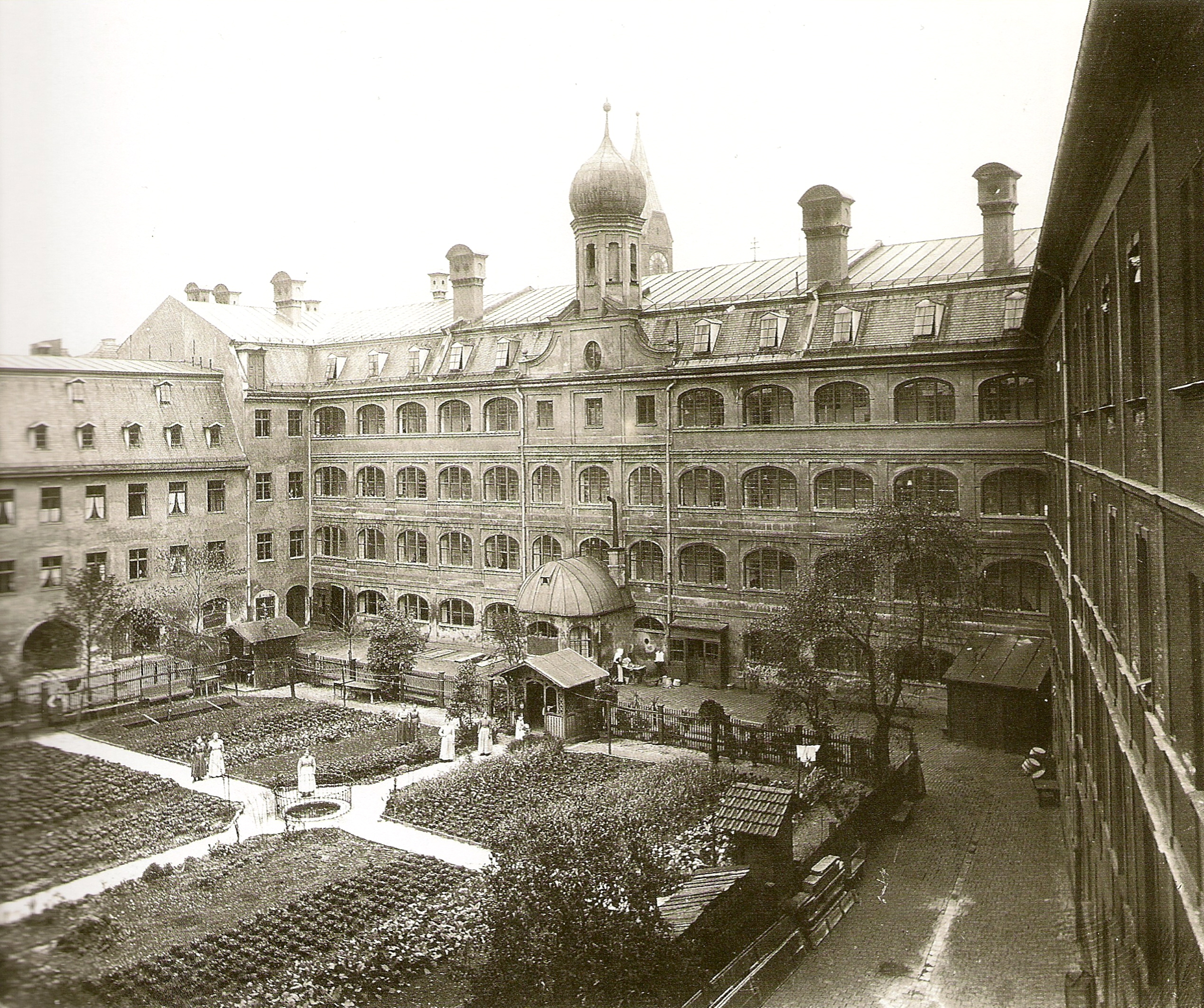 Ehem. Josephspital (Hof), Josephspitalstrasse 12, München